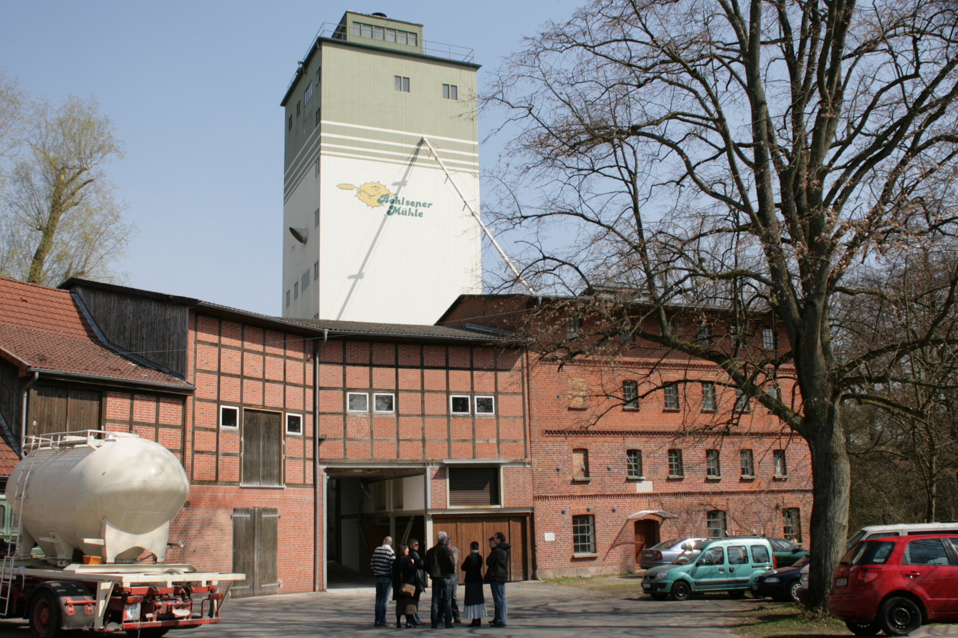 Wassermühle Bohlsen an der Gerdau, Mühlenstraße 1 in Gerdau-Bohlsen